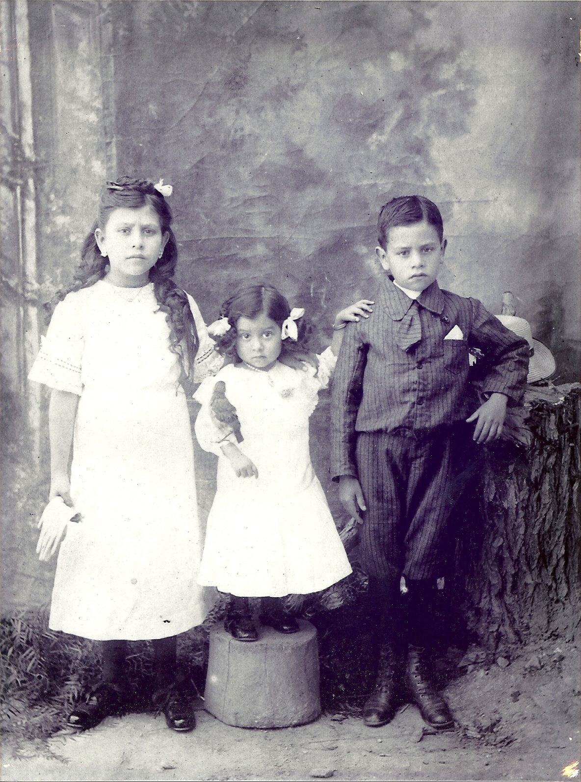 Hijos de la familia Paniagua Falcón